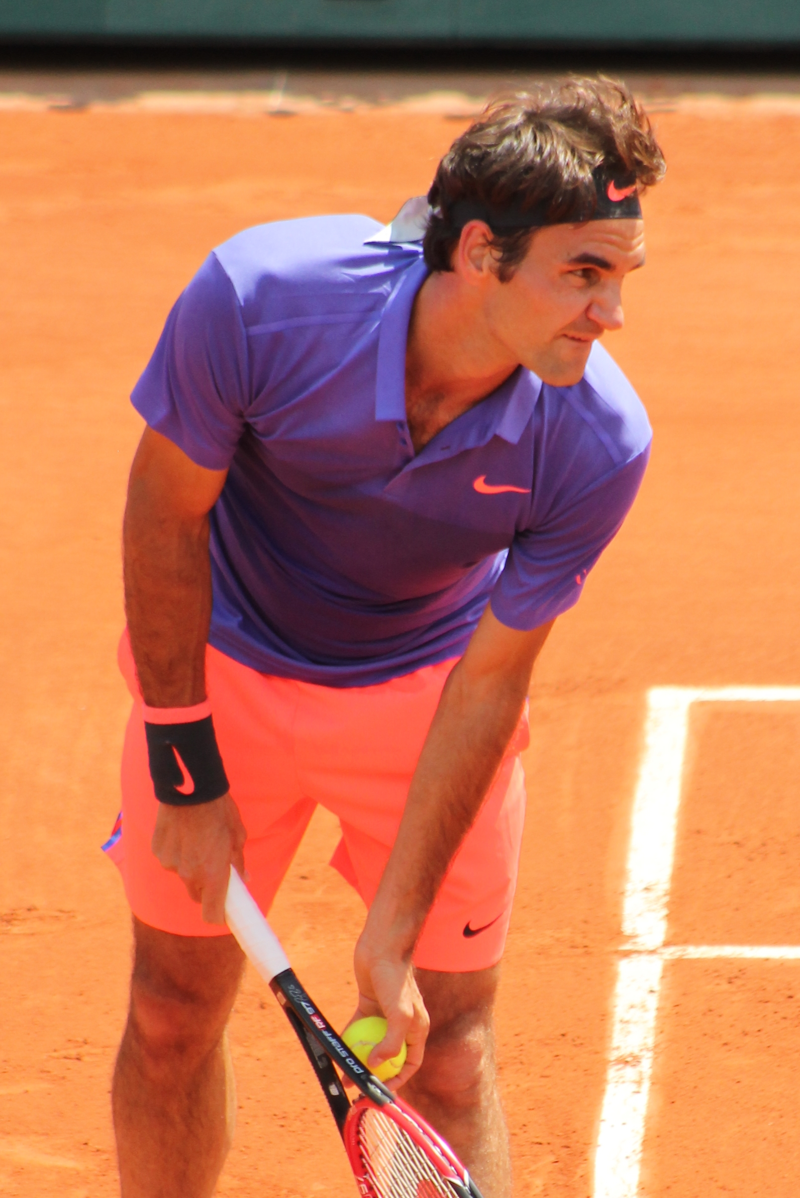 Federer RG15 (55)